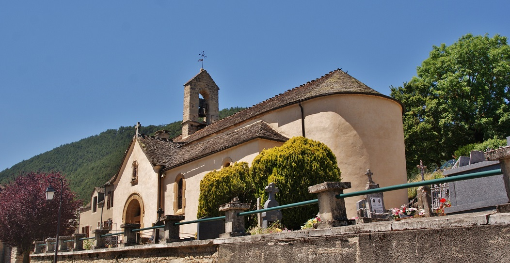 église St Bauzile